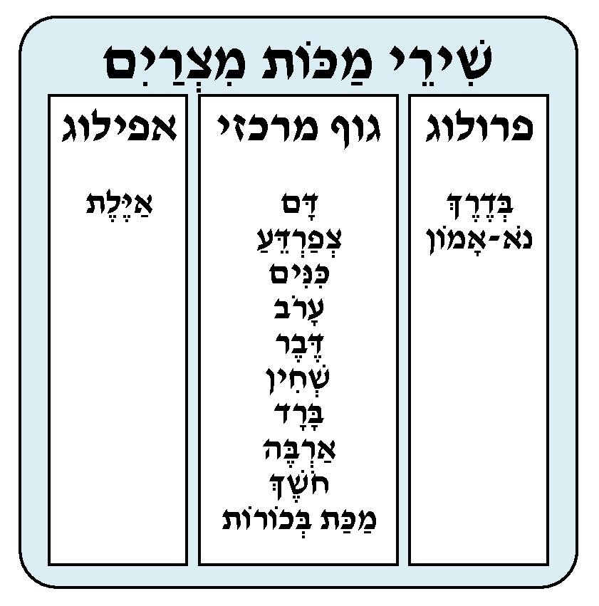 שירי מכות מצרים טריפטיכון מבוסס על